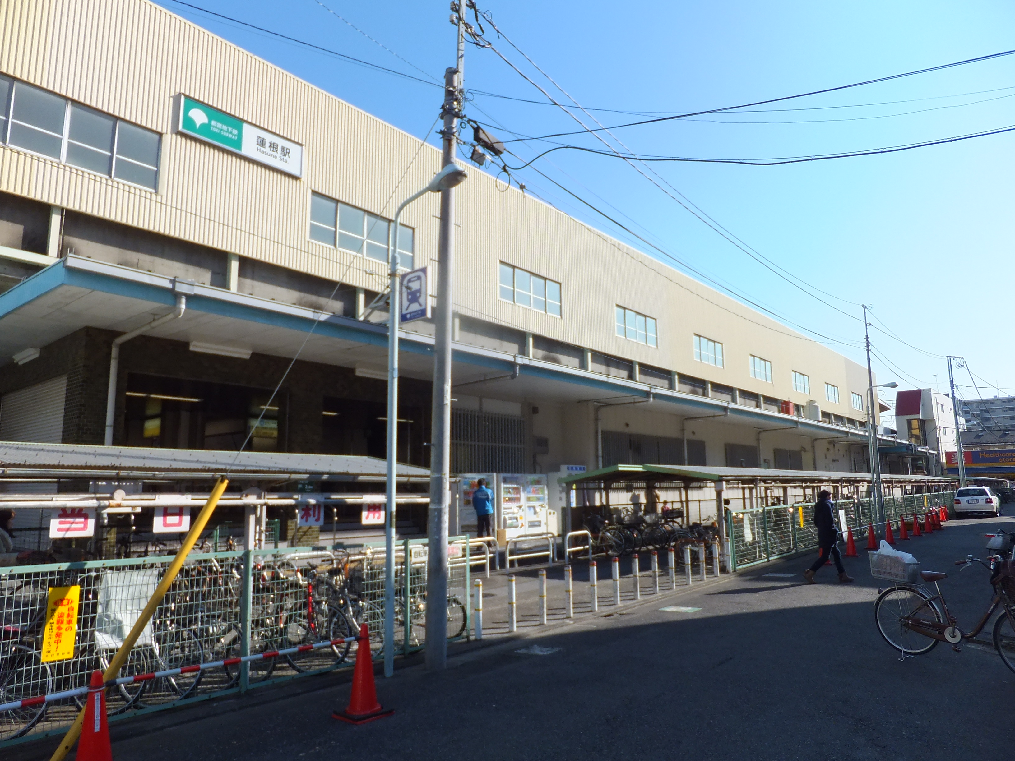 都営三田線・蓮根駅（東京都板橋区）駅西側